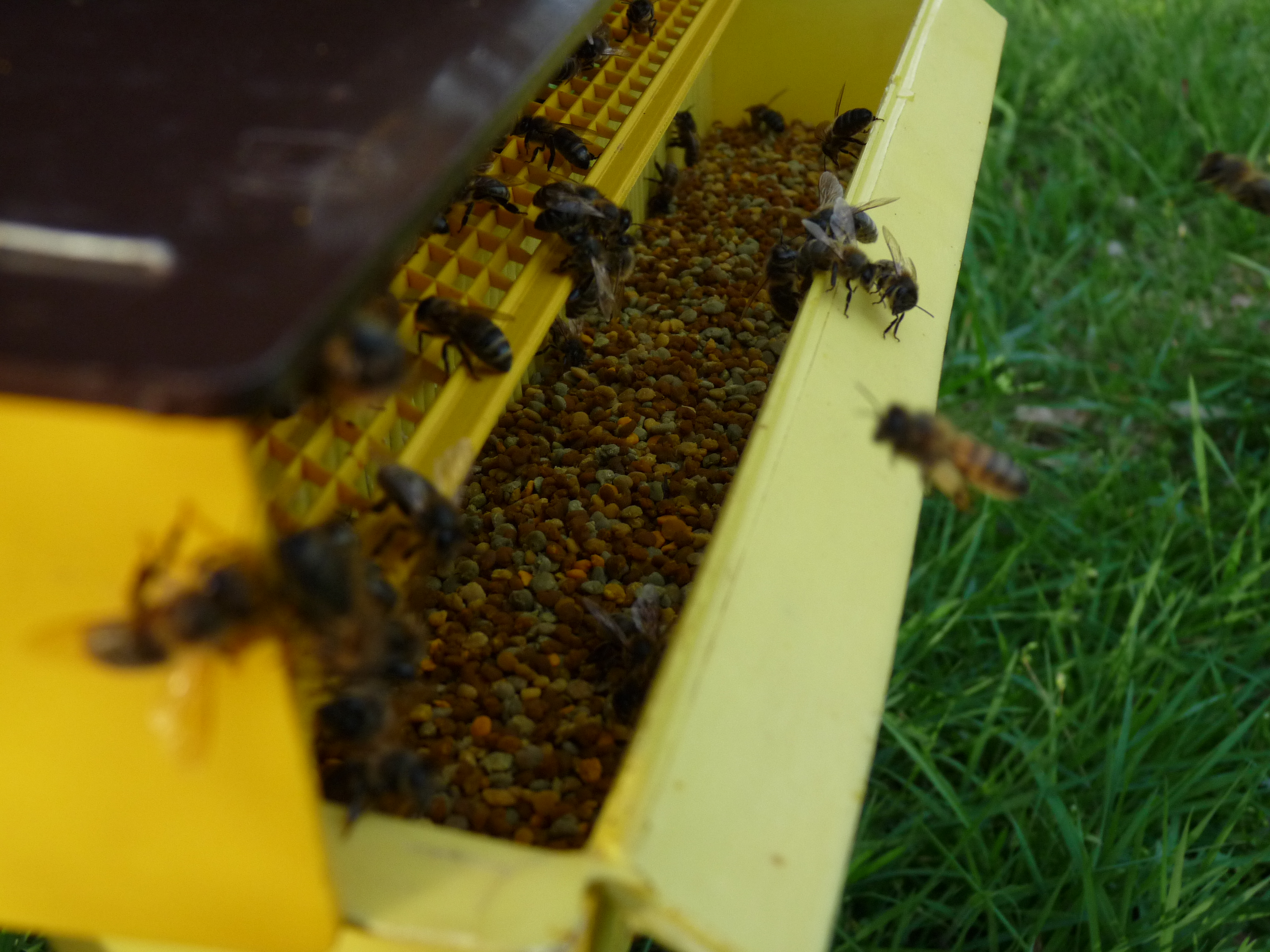 Grille à Pollen et abeilles (Apis mellifera)